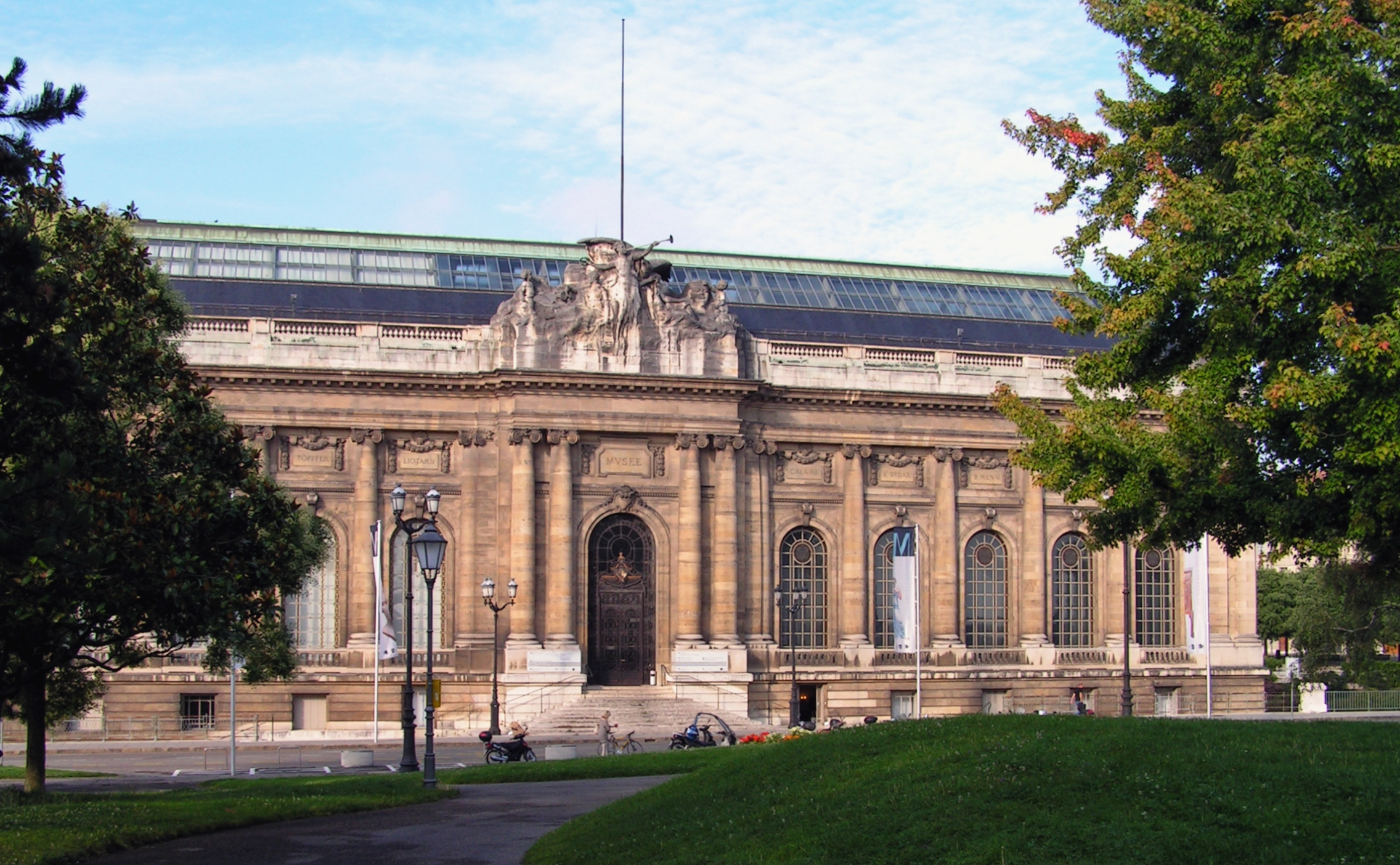 Rue Charles-Galland 2, Genève. Musée d'art et d'histoire. Vue de la promenade de l'observatoire.